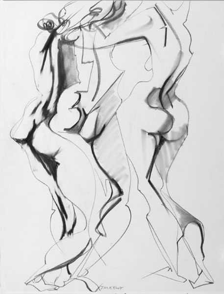 Karl Lorenz Kunz - Bleistiftzeichnung